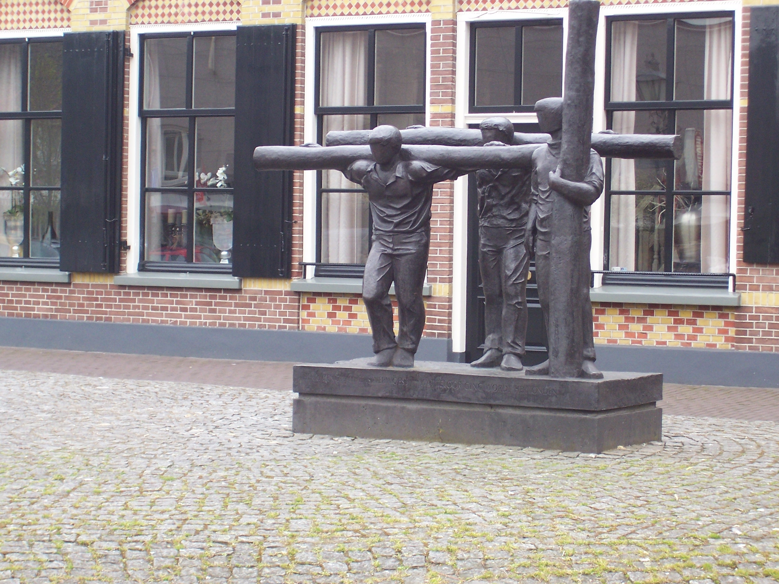 HERRIJZEN ZAL WAT IS VERWOEST WAT TELOOR GING WORDT HERVONDEN. Jesaja 44:26, beeld Gerard Overeem, 1997.